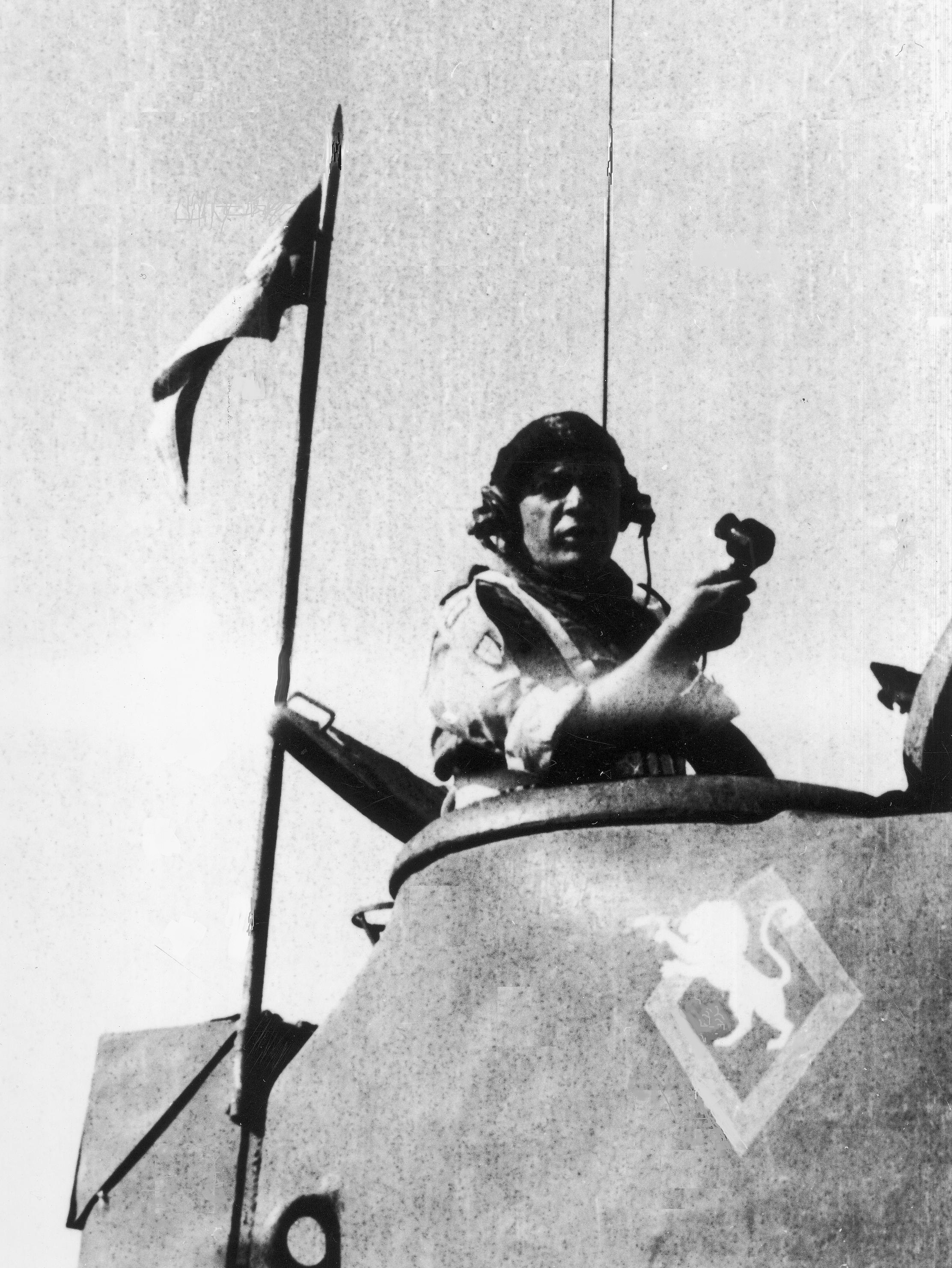 Żołnierze 2 Korpusu Polskiego w Loreto. Dowódca 6 Pułku Pancernego "Dzieci Lwowskich" ppłk Feliks Motyka w czołgu M4 Sherman. Archiwum Fotograficzne Tadeusza Szumańskiego. Sygnatura: 24-467-11